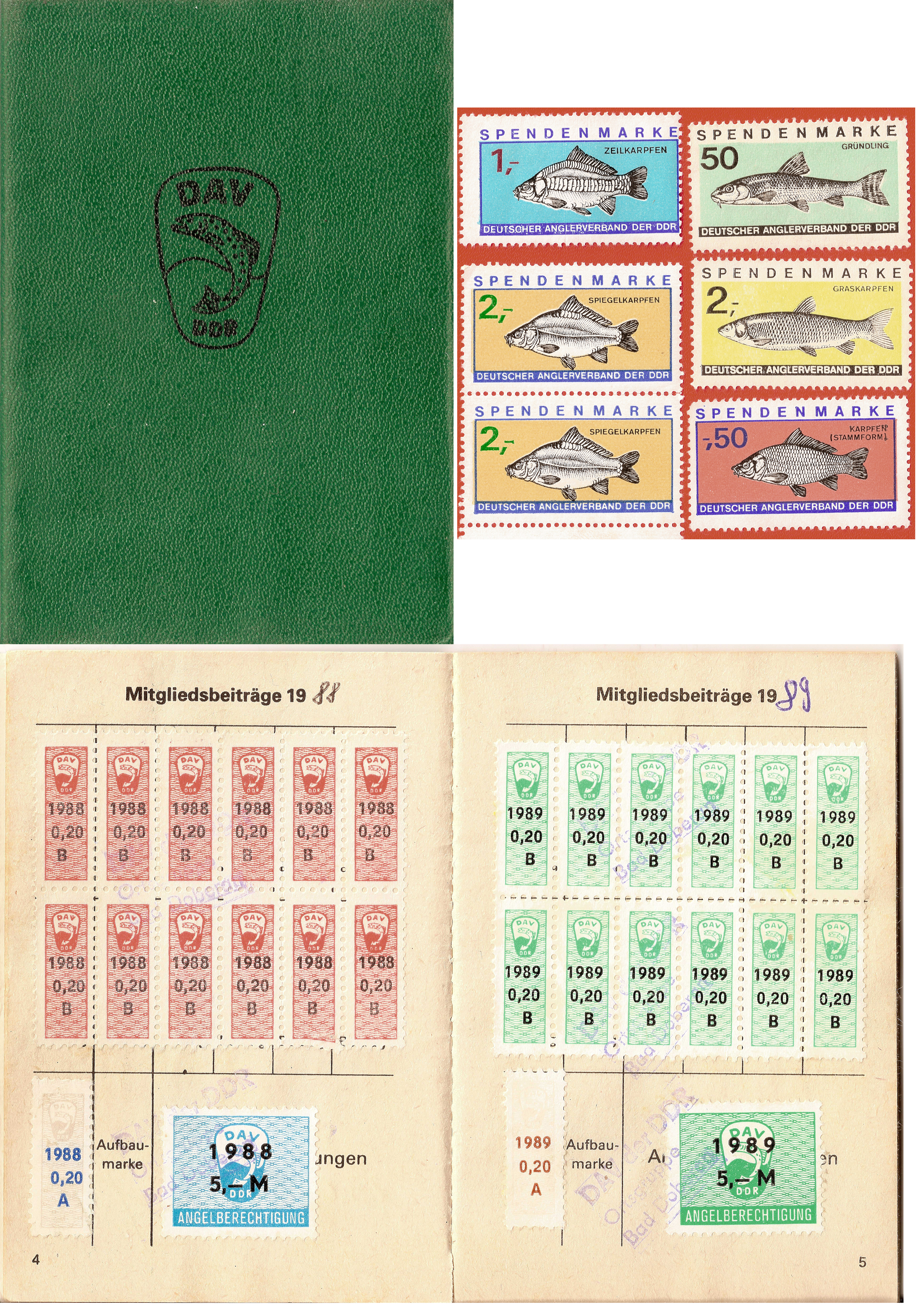 Ausweis Deutscher Angler-Verband der DDR, DAV, Beitragsmarken 1988 - 1989, Spendenmarken